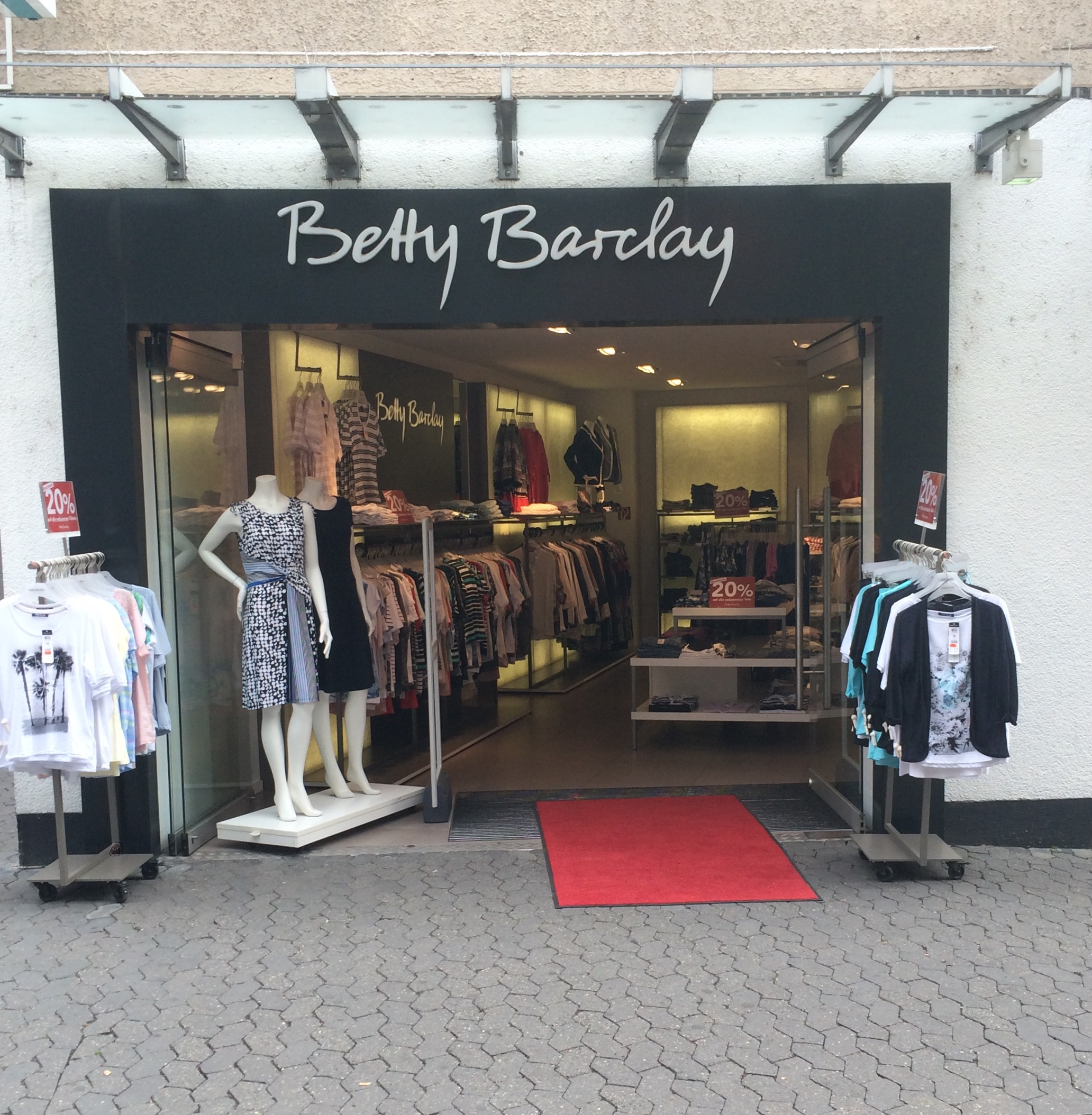 betty Barclay Geschäft